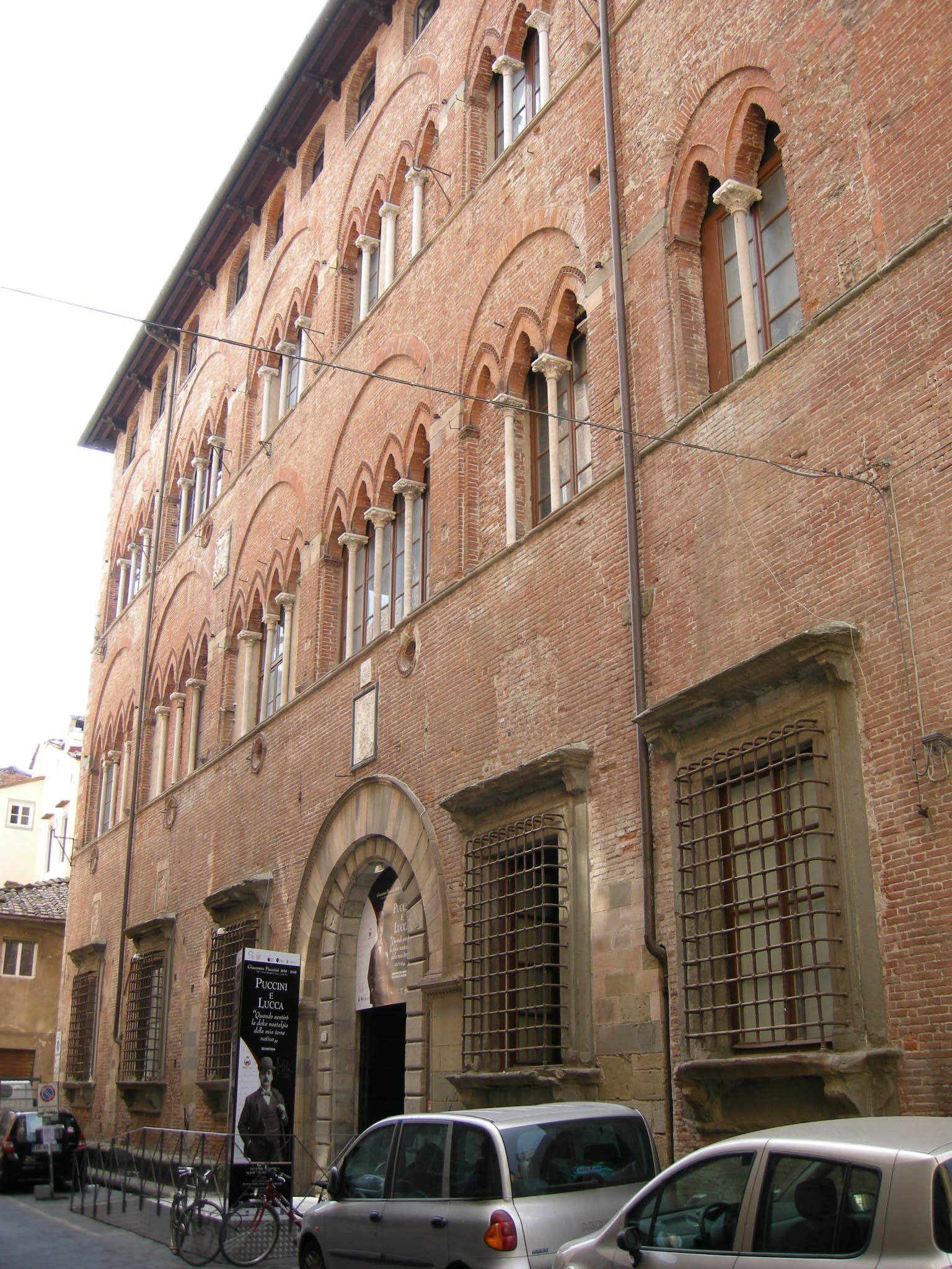 Lucca, casa guinigi